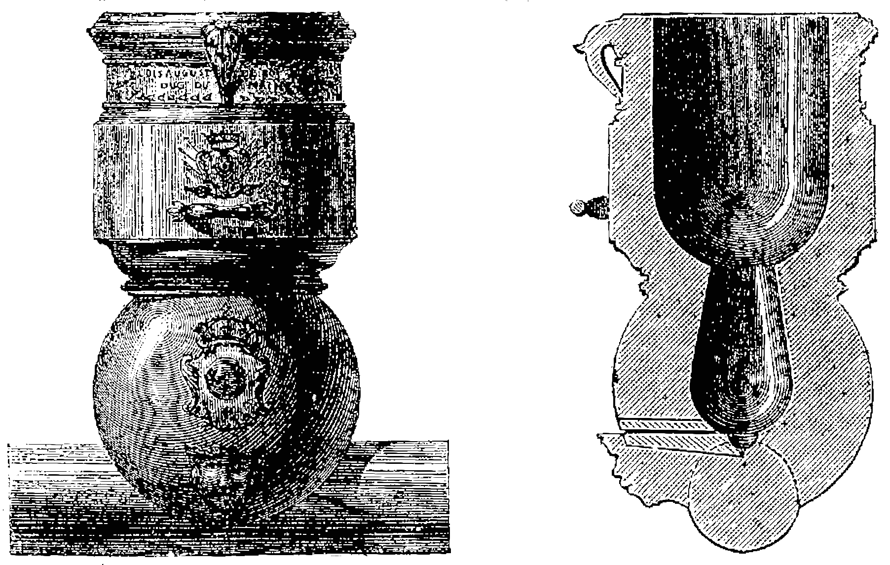 Mortier de l’artillerie de Louis XIV (système de Vallière)